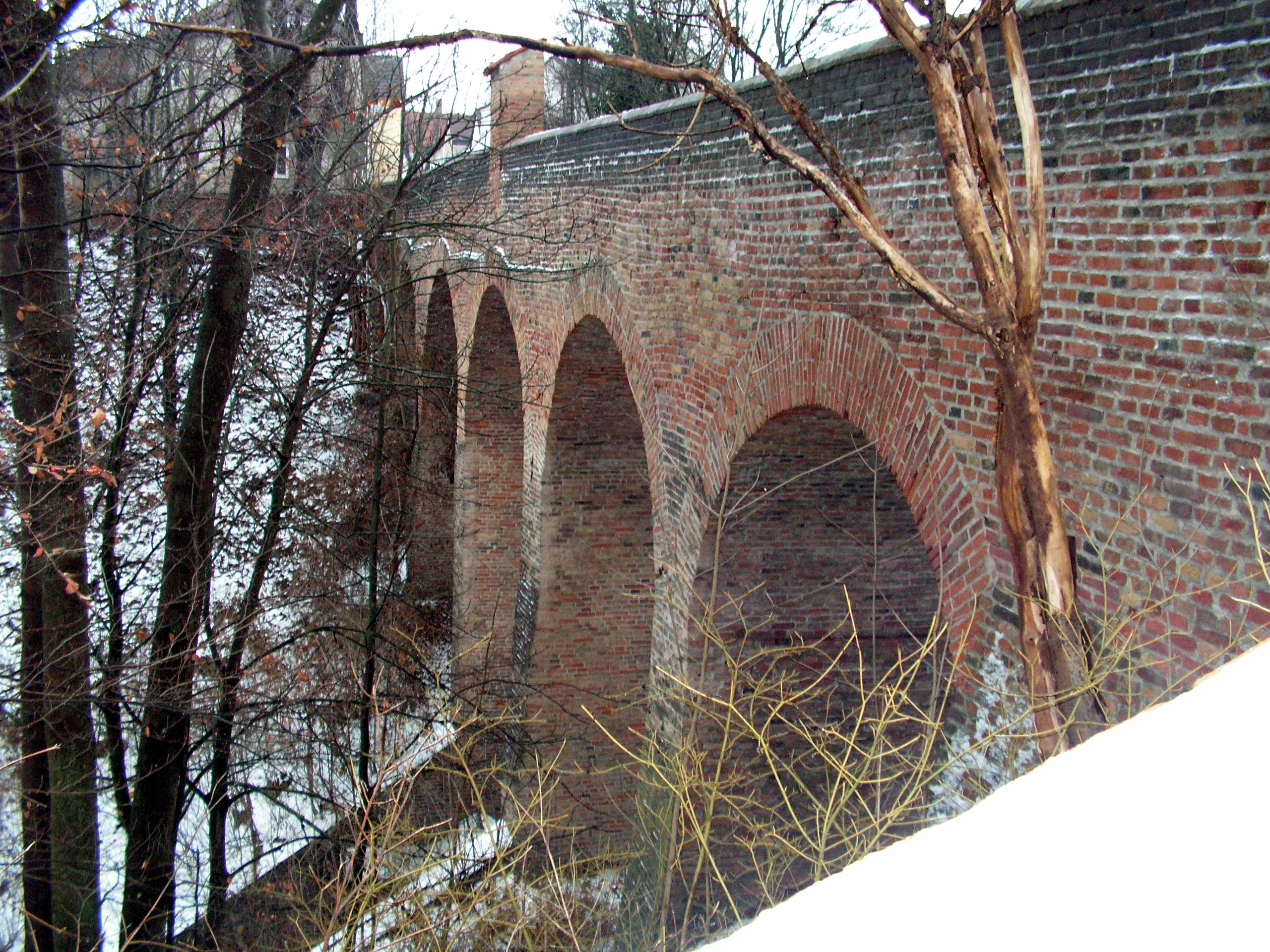 Hochbrücke in Dingolfing von Südwesten